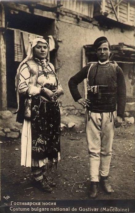 Гостиварска женска и мъжка носия